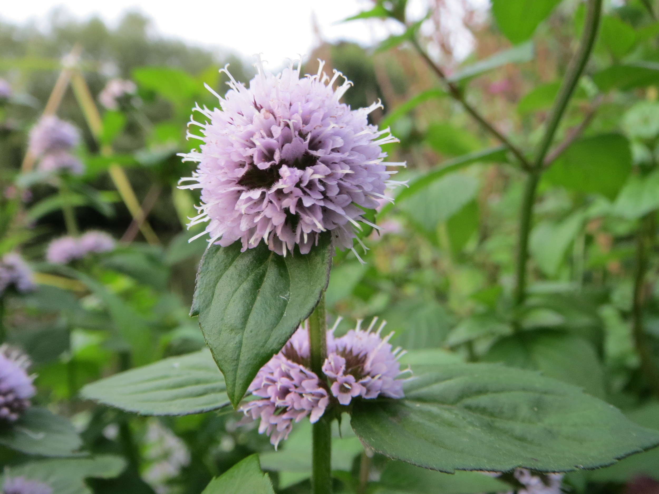 Wasserminze (Mentha aquatica) an der Saar in Saarbrücken